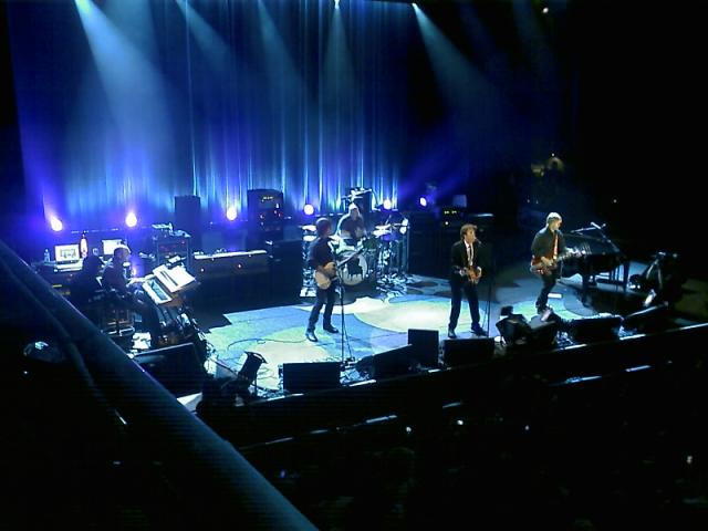 Paul McCartney à l'Olympia de paris le 22 octobre 2007